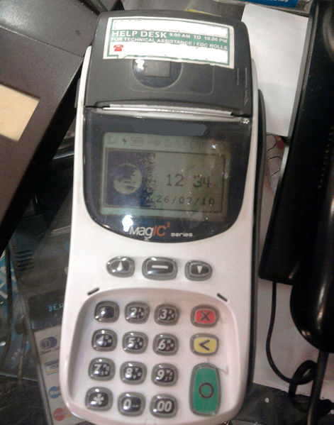 ക്രെഡിറ്റ് കാർഡ് സ്വൈപ്പിങ് മെഷീൻ